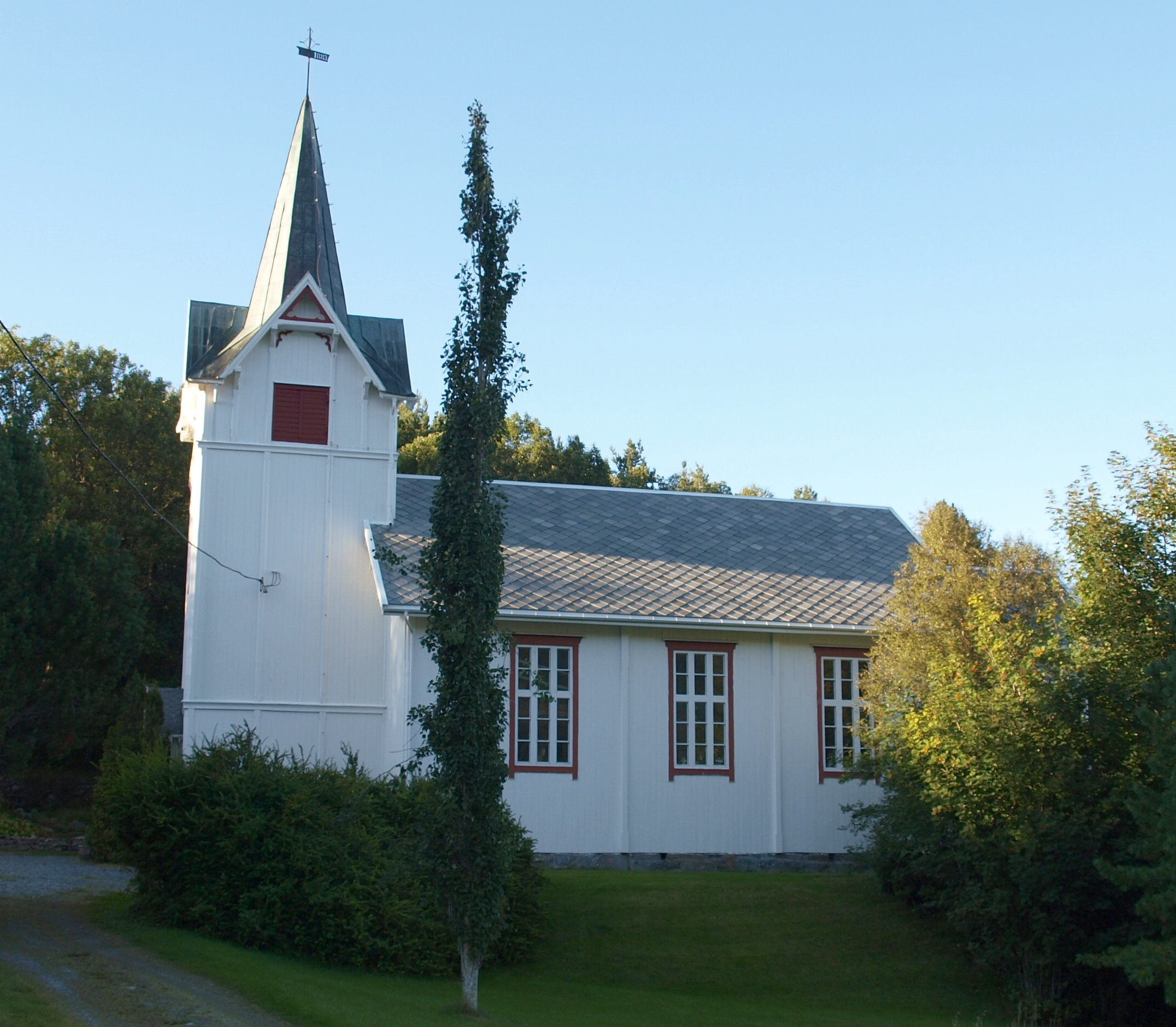 Heim kirke. Foto: Olve Utne, fra Lokalhistoriewiki.